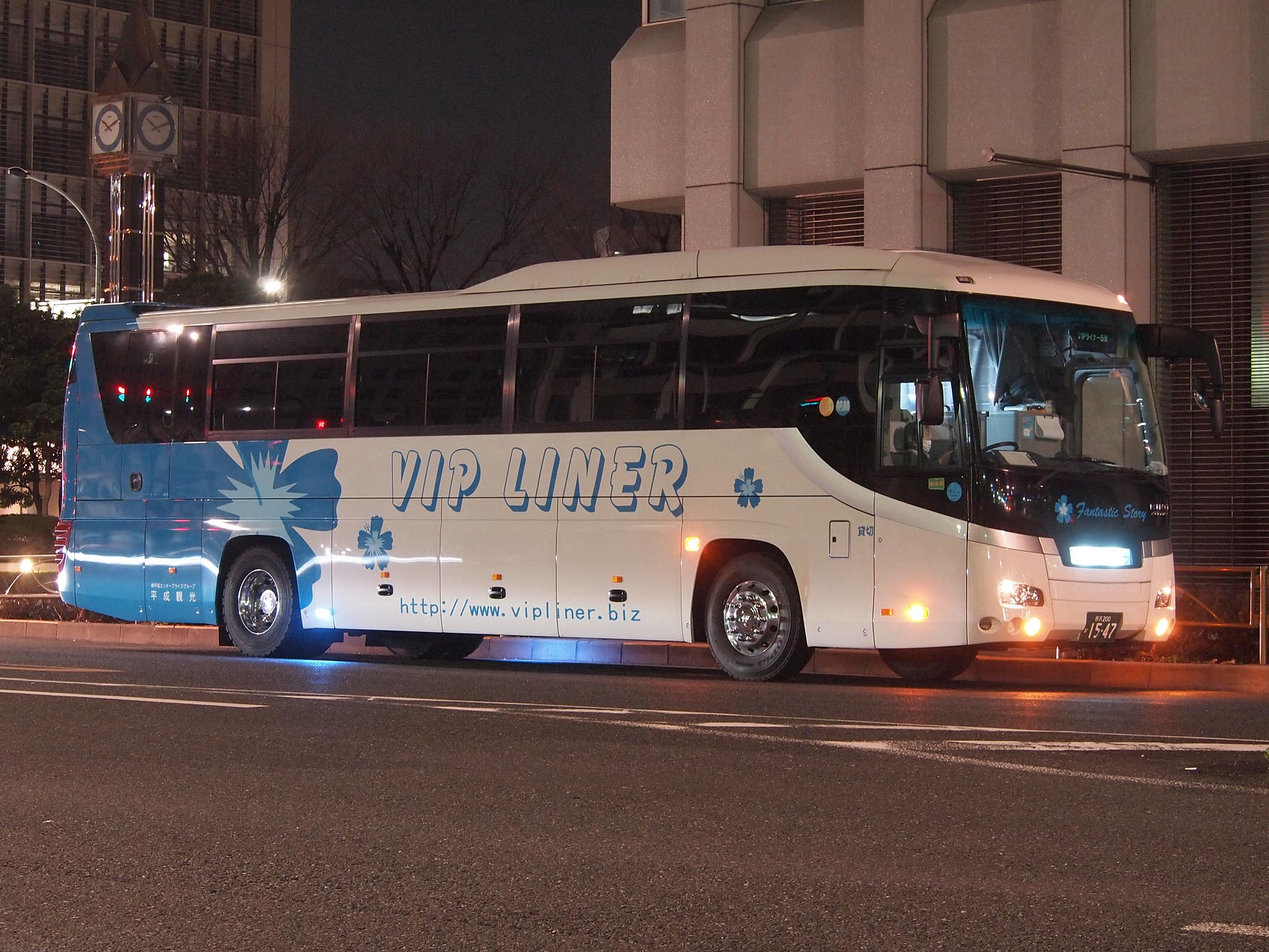 平成エンタープライズが運行する会員制都市間ツアーバス「VIPライナー」専用車。 型式：日野セレガ RU1ESAA 登録番号：所沢200か1547 撮影地：東京都中央区・呉服橋交差点付近